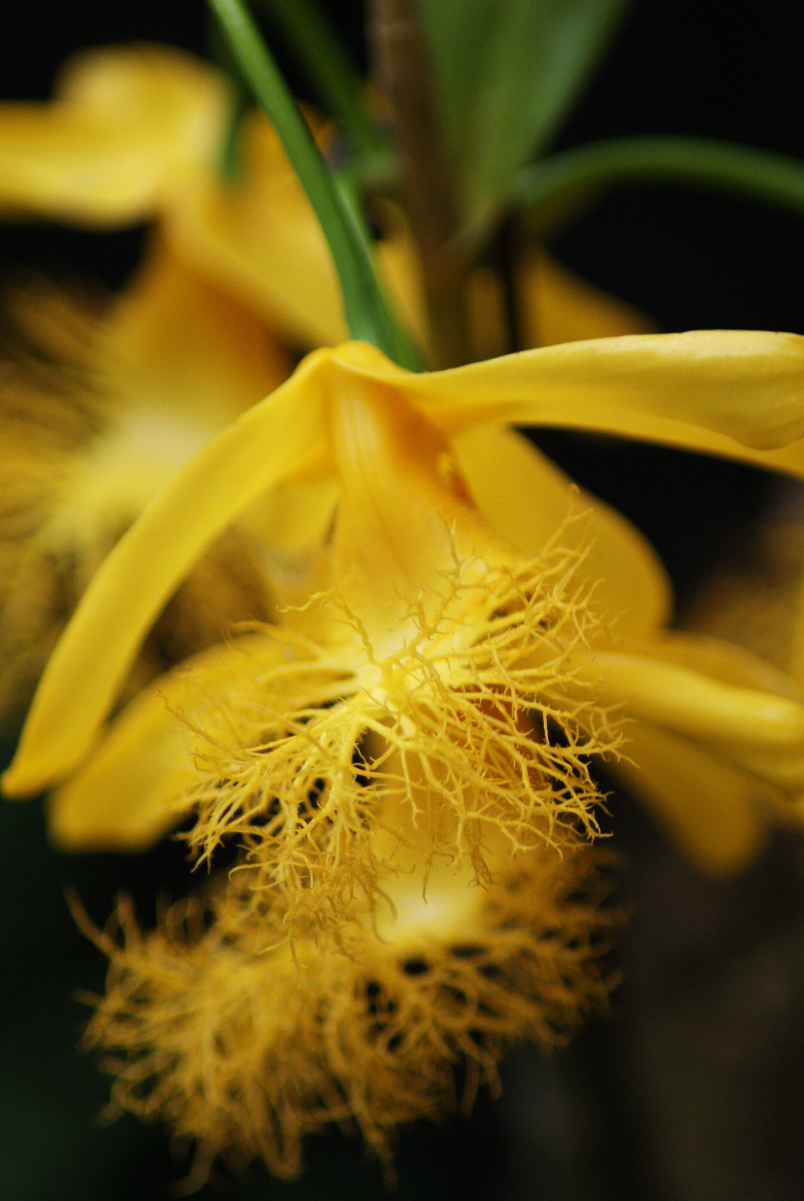 Dendrobium brymerianum flower.